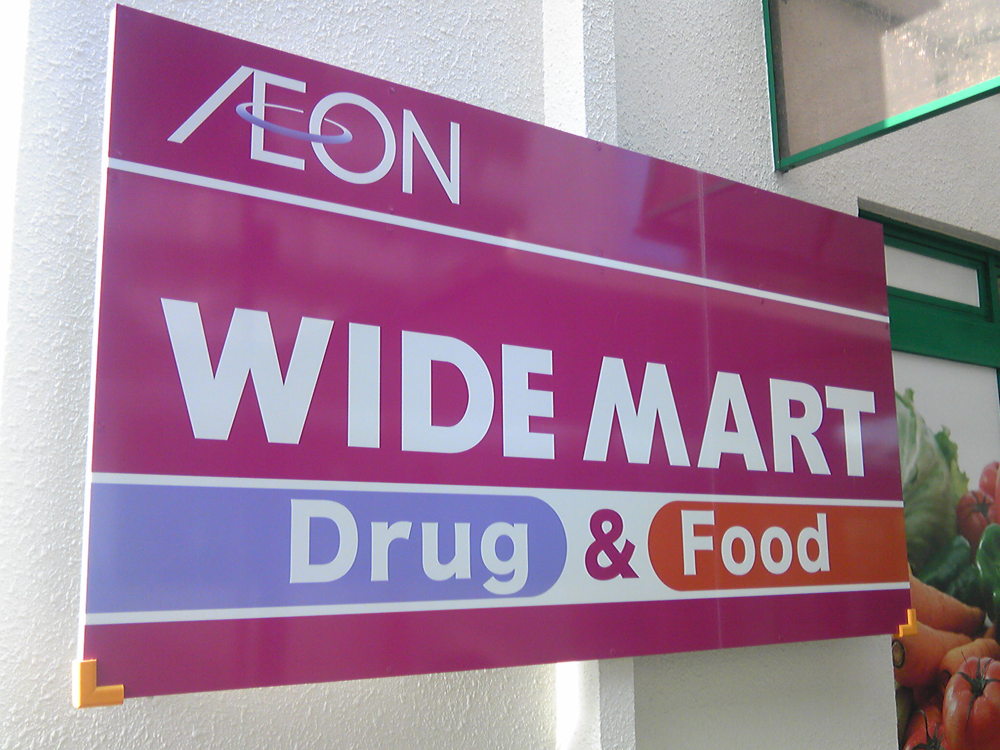 ワイドマートD&F壱岐団地店の入口看板